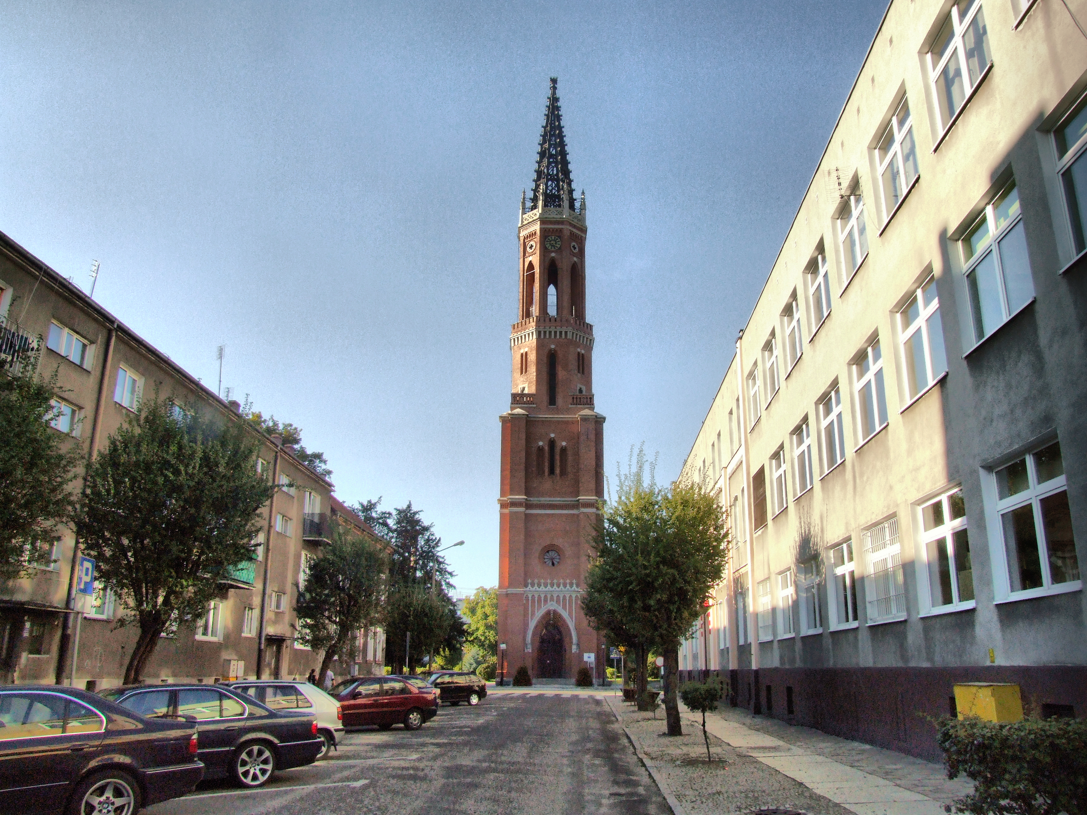 Wieża dawnego kościoła ewangelickiego w Żaganiu